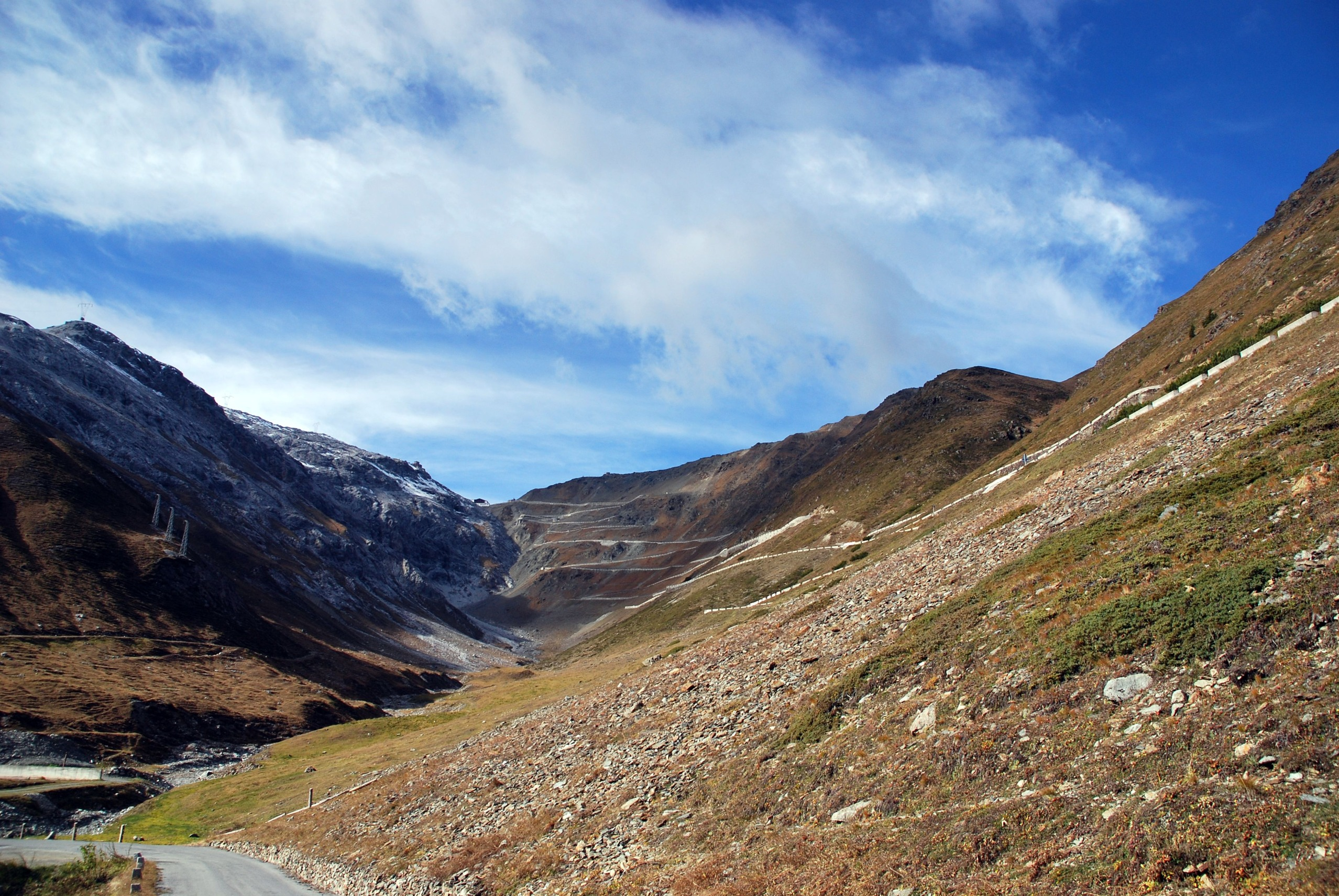 Ostrampe des Stilfser Jochs